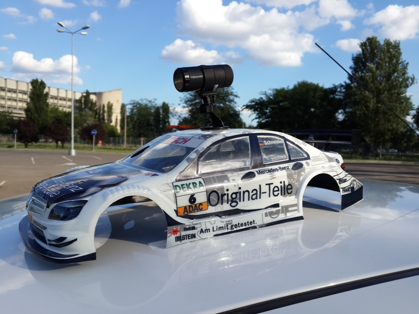 Спортивный видеорегистратор Highscreen, установленный с помощью крепления из комплекта на крышу миниатюрного радиоуправляемого гоночного автомобиля.